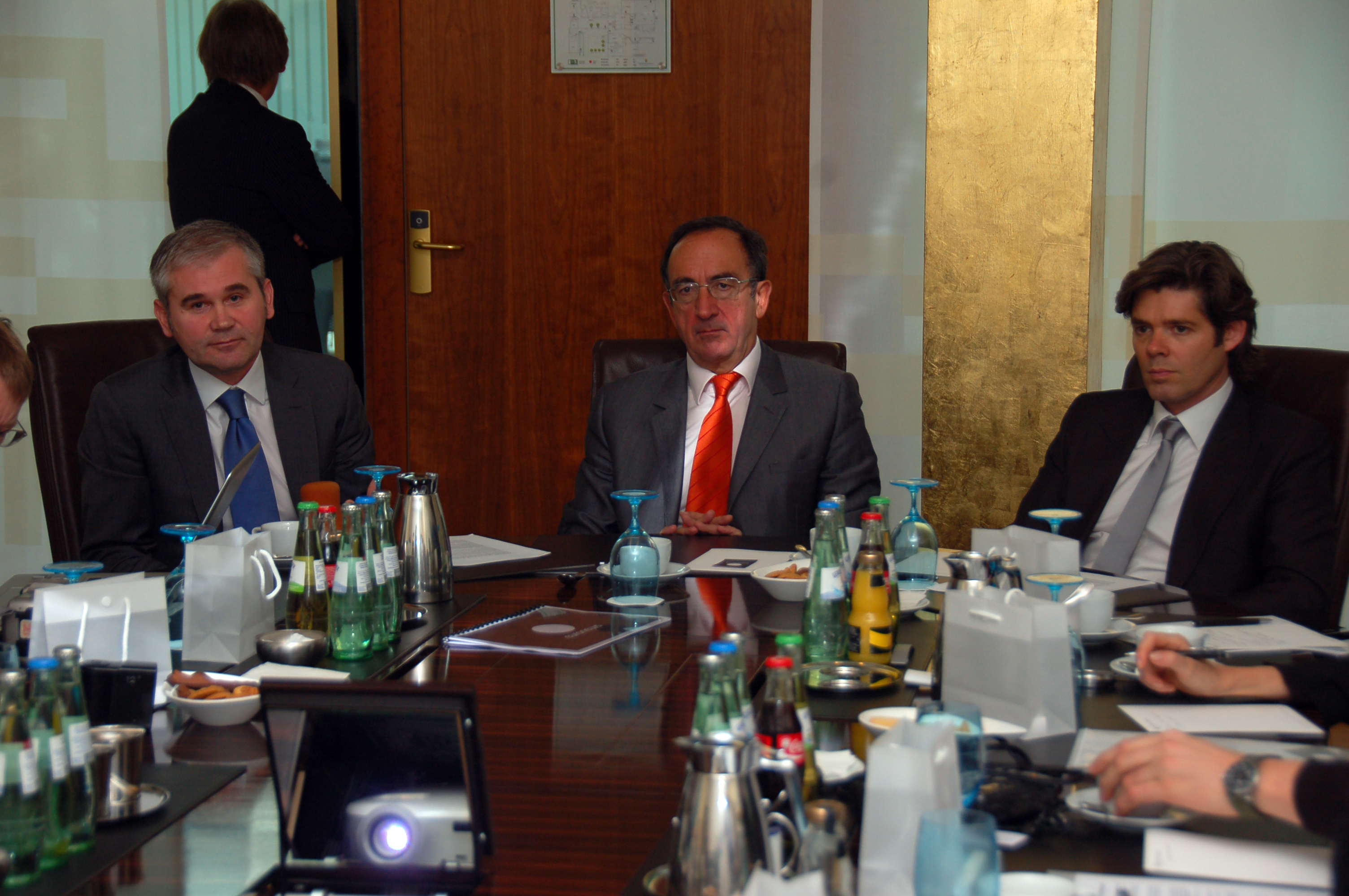 Pressekonferenz euronews im Hotel Intercontinental v. l. n. r.: Lucian Sârb (Leiter der Redaktion und Programmdirektor seit 2009), Philippe Cayla (Präsident und Vorsitzender des Vorstandes seit 2003) und Michael Peters (Geschäftsführer und Vorstandsmitglied seit 2005)